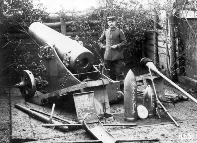 21 cm-Mörser im 1. Weltkrieg